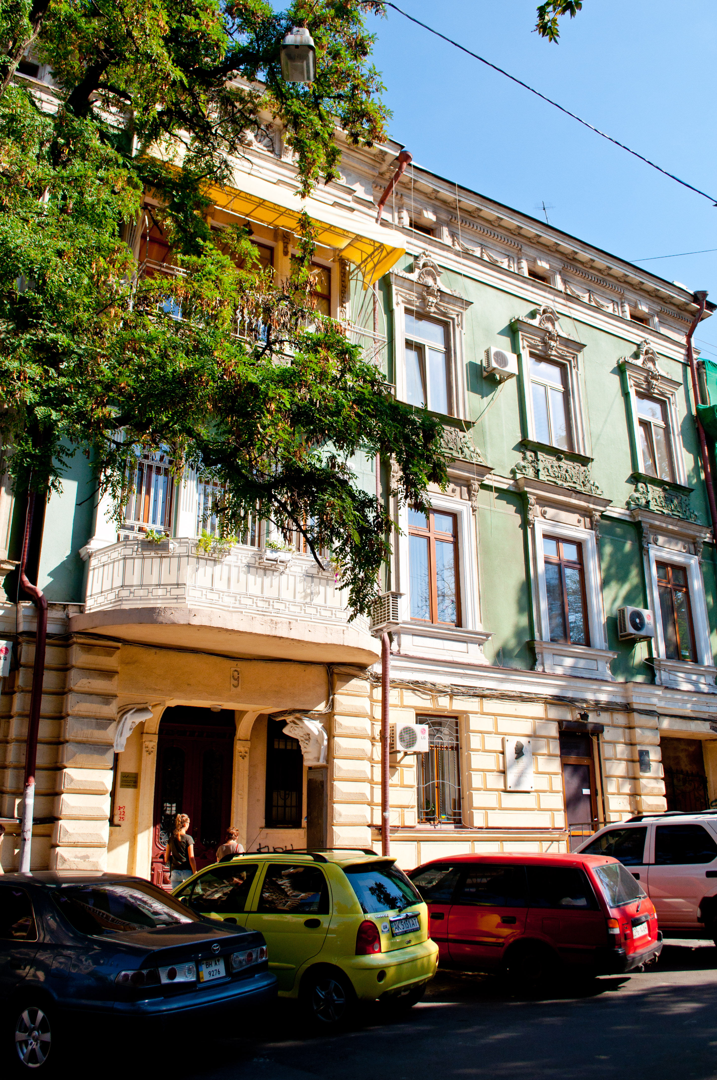 Будинок житловий Шемякіна, в якому жили:В.П. Філатов - вчений-офтальмолог, академік;С.С. Головін - професор-офтальмолог; Є.А. Шевальов - вчений-психіатр;І.І. Іванов - історик і літературний критик, професор;- А.М. Агаронов - професор